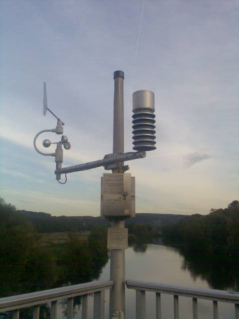 Wetterstation auf einer Brücke an der Ruhr; Nachtigallbrücke in Witten